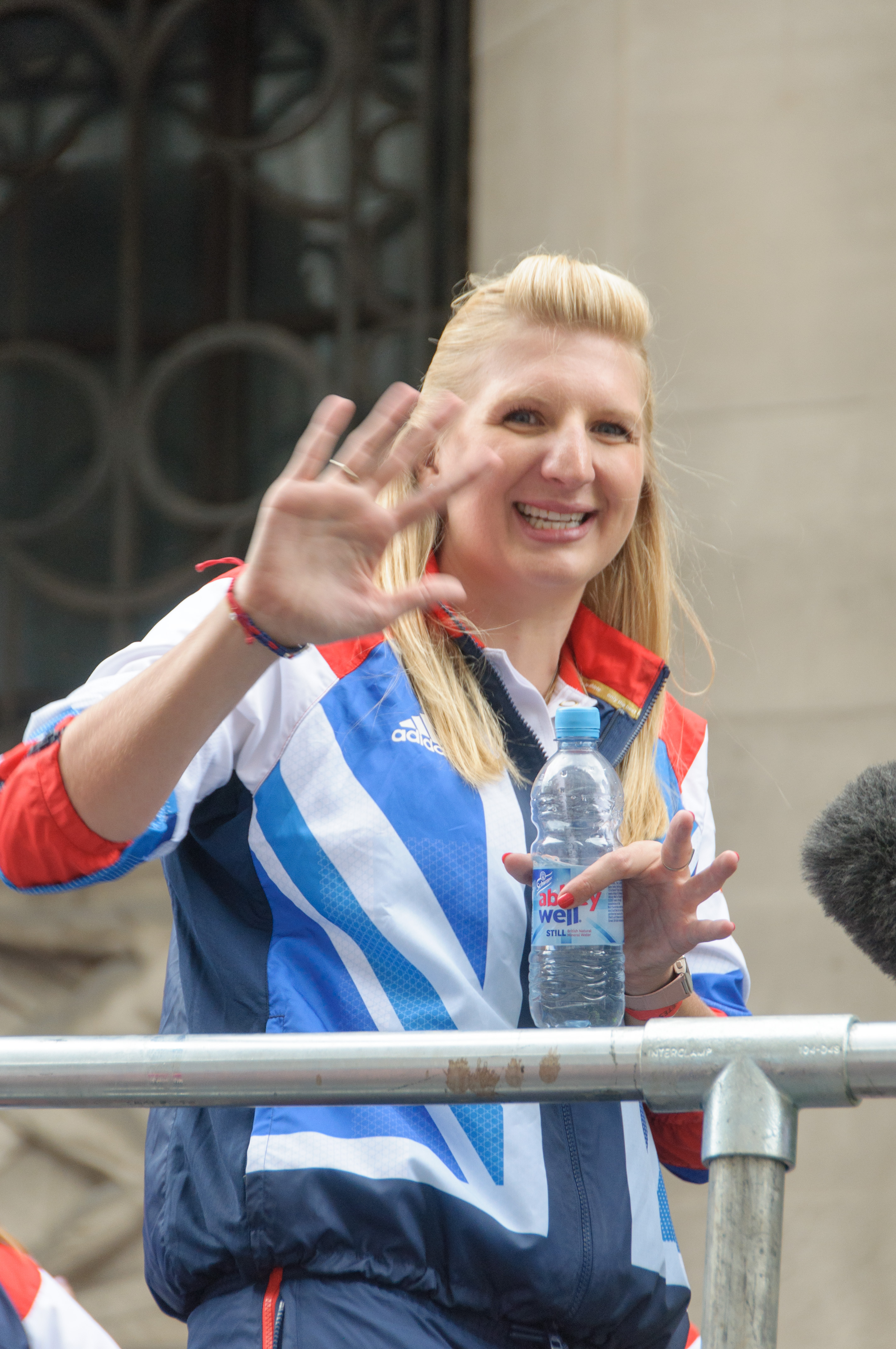 Becky Adlington